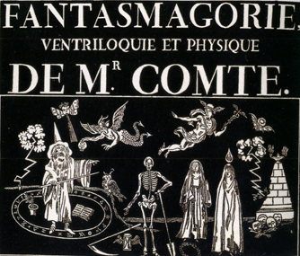 Affiche publicitaire gravée sur bois.